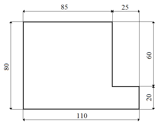 Acotació correcta d'una figura